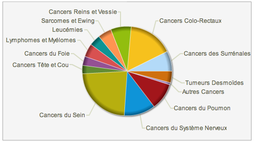 Une base de données de plus de 7000 échantillons tumoraux humains annotés de façon standardisée